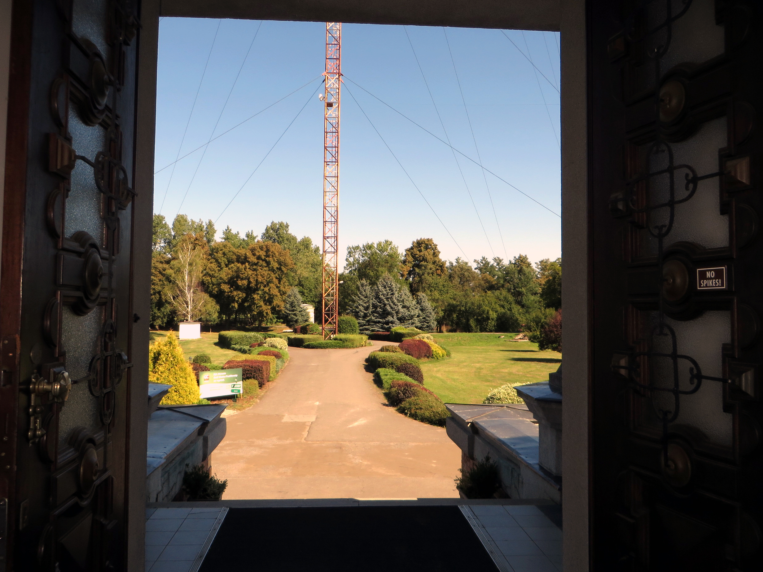 Radiostanice v Poděbradech – vstup a severní věž.